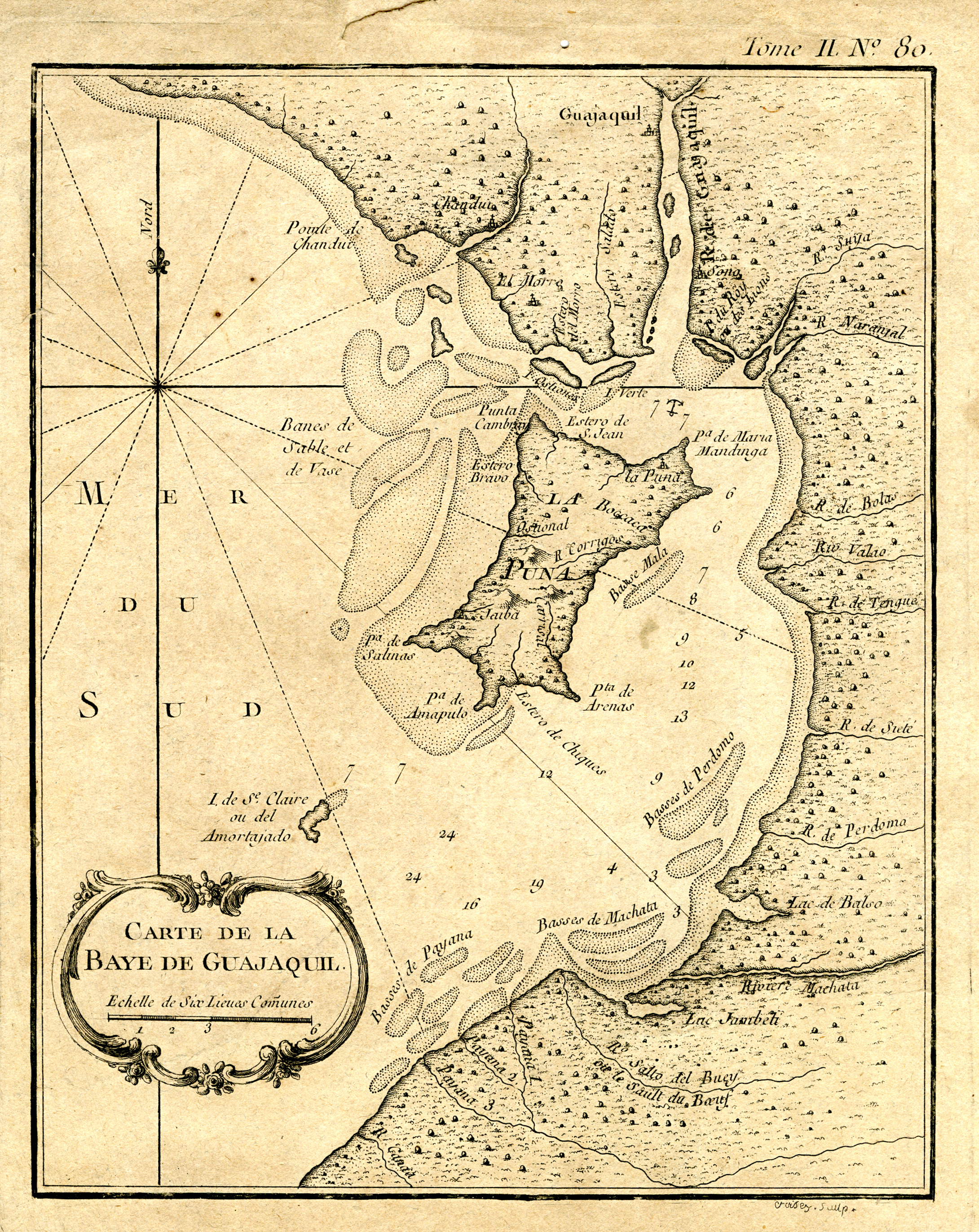 Diapositiva de acceso público consultada del ejemplar original que se custodia en los Fondos Bibliográficos y Cartrografico (Sección: Historia de Guayaquil) del Archivo Histórico del Guayas - Guayaquil, Ecuador.Consultado y compartido por el usuario J. Javier García A.